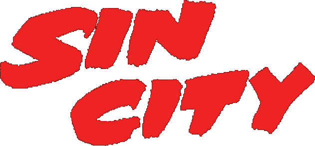 Fuente tipográfica "Sin City" con el escrito Sin City de la serie de comics escritas y dibujadas por Frank Miller.